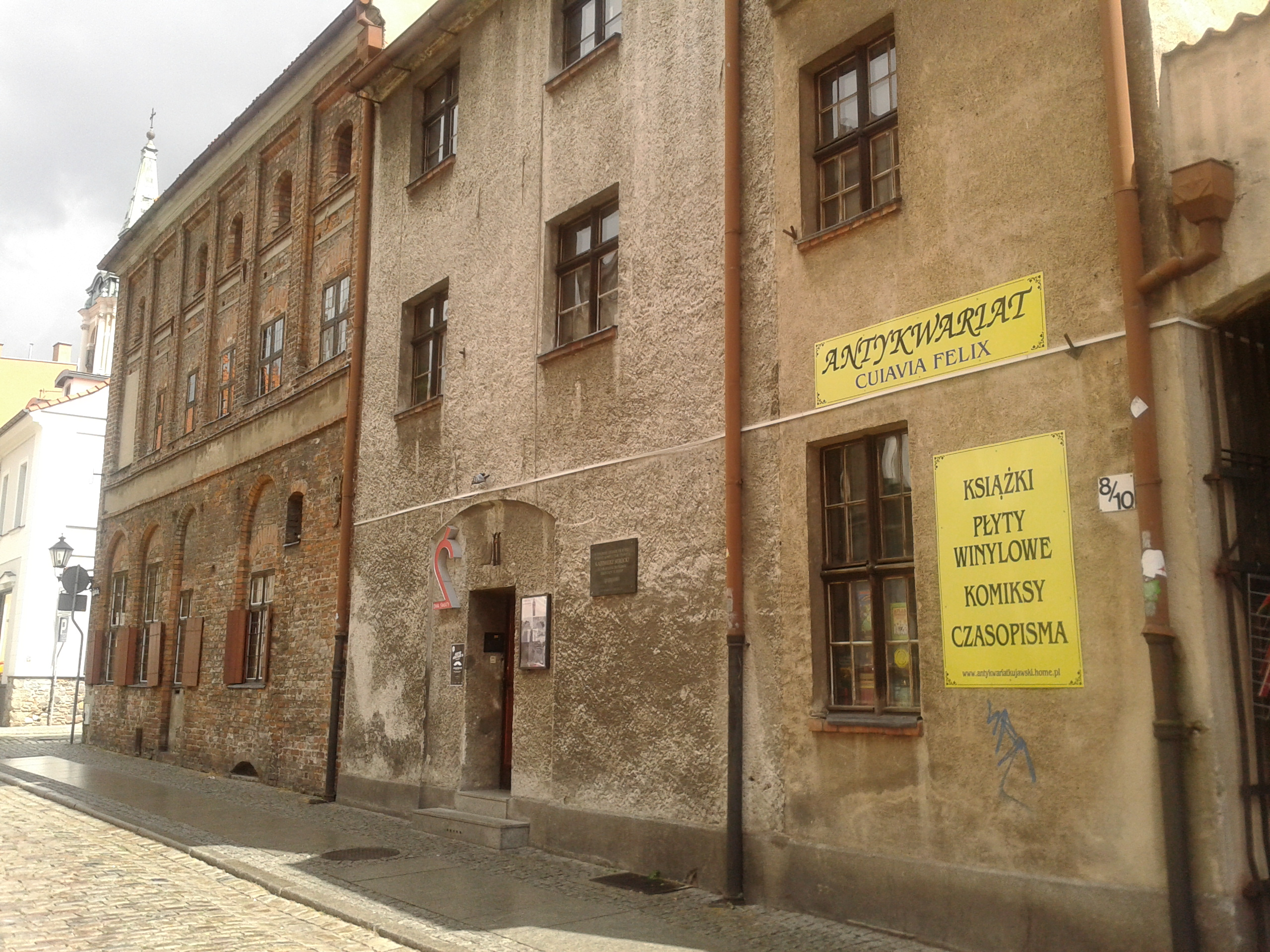 Miejsce urodzenia Kazimierza Serockiego - ul. Ducha Świętego 12 w Toruniu